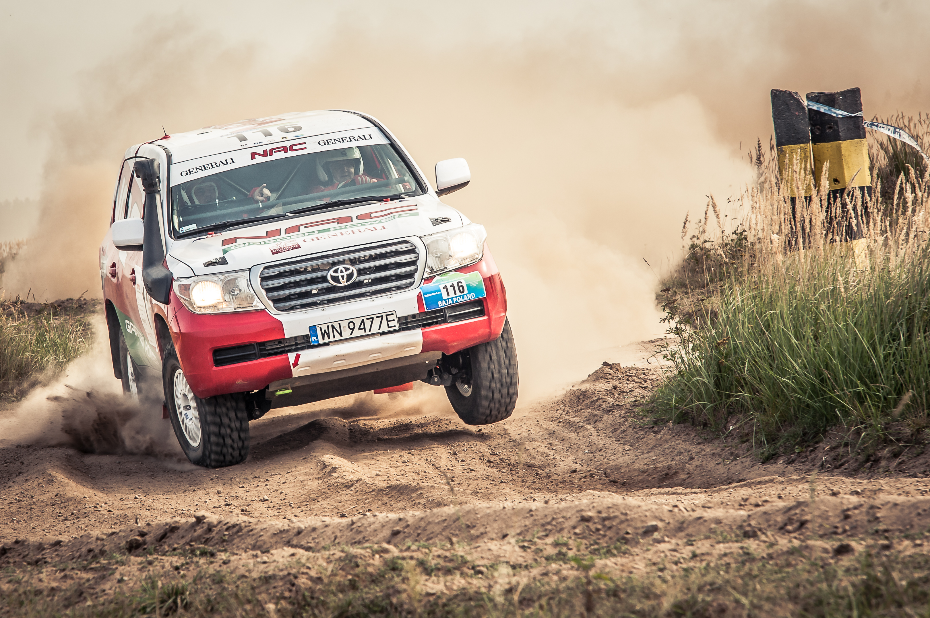 Toyota Land Cruiser VDJ200 w specyfikacji T2